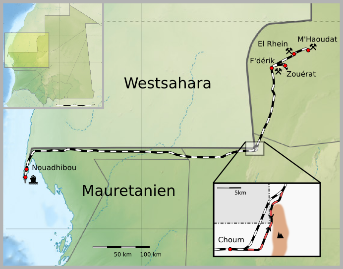 Karte der Erzbahn in Mauretanien